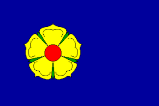 Jindrichuv hradec prapor